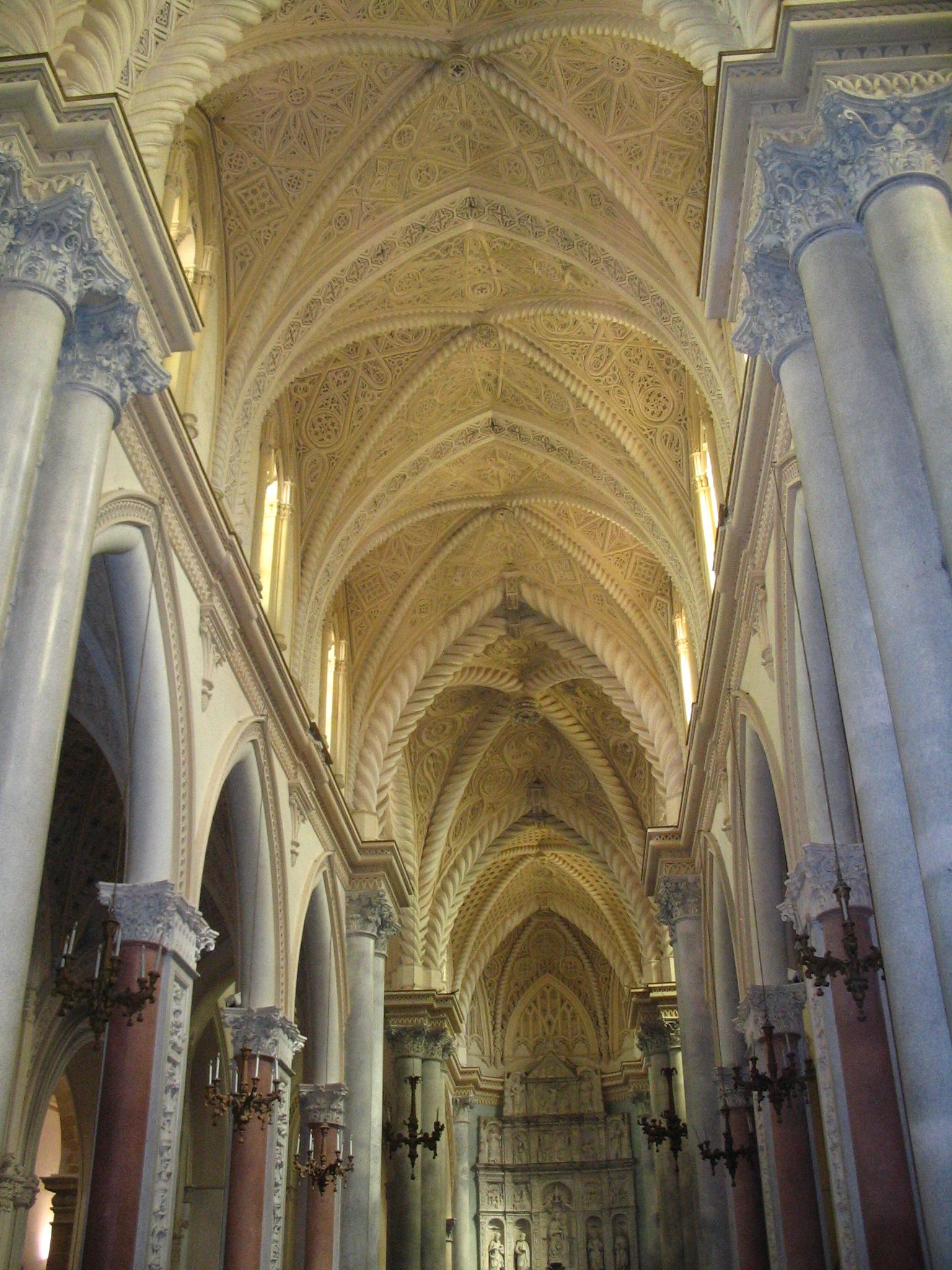 Erice (Sicile) - interieur de la Chiesa Matrice